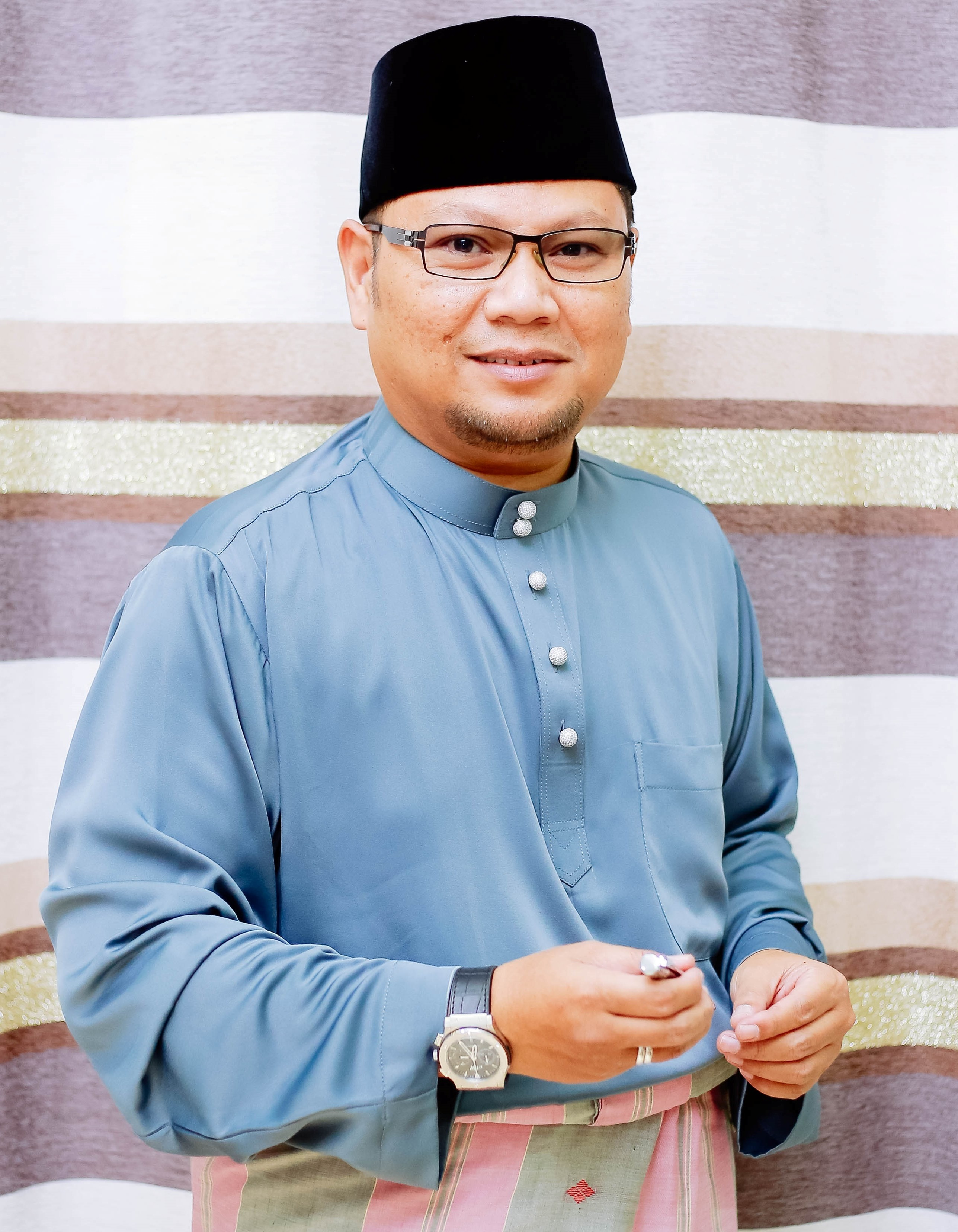 Badli Shah 2018